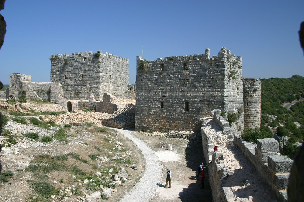 Südbastion mit Donjon Autor: Benutzer:Mewes